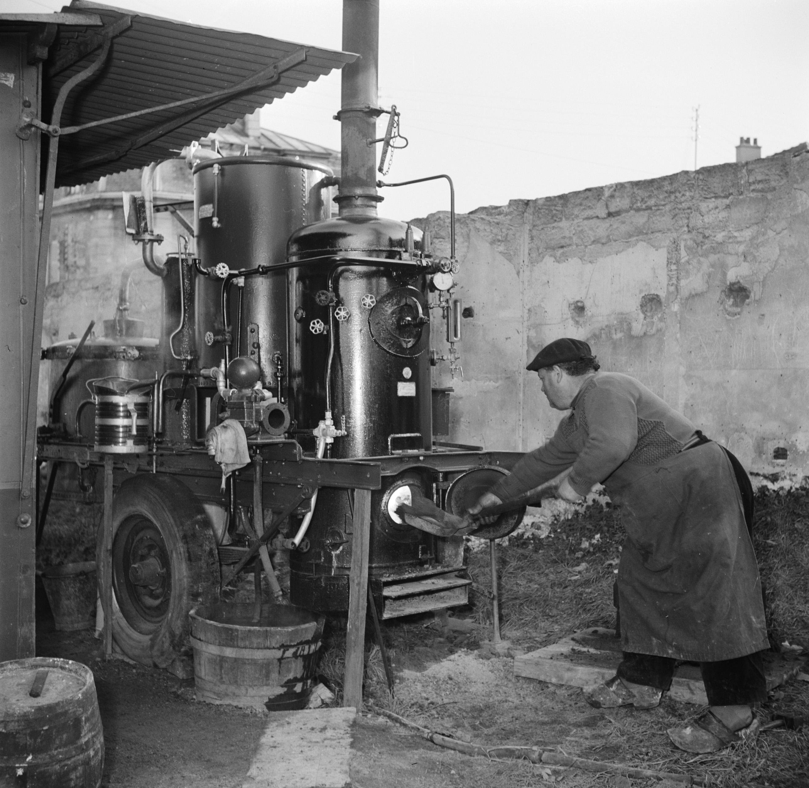 Collectie / Archief : Fotocollectie Van de Poll Reportage / Serie : Destilleerketel in de open lucht Beschrijving : Man gooit kolen op het vuur van de distilleerketel Datum : 1950 Locatie : Frankrijk, Parijs Trefwoorden : alcohol, distilleerderijen, mannen, steenkool, stoommachines Fotograaf : Poll, Willem van de Auteursrechthebbende : Nationaal Archief Materiaalsoort : Negatief (zwart/wit) Nummer archiefinventaris : bekijk toegang 2.24.14.02 Bestanddeelnummer : 252-9467